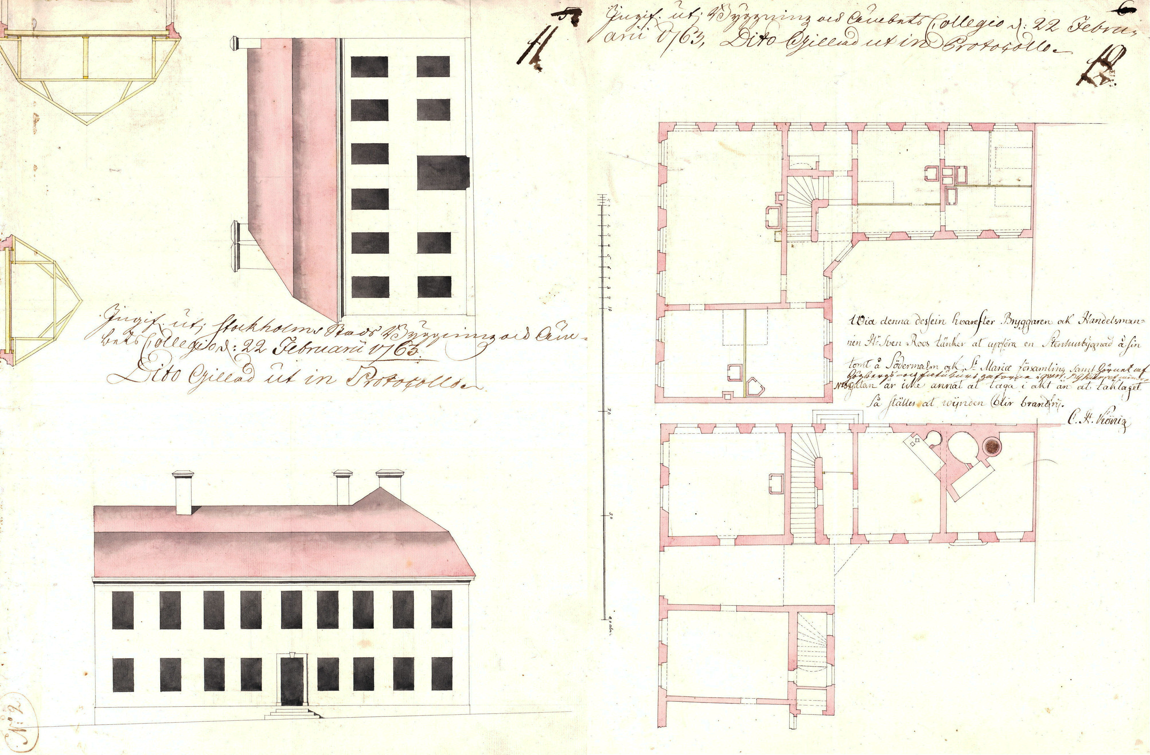 Ritning för Nürbergs Bryggeri, beställare bryggare Sven Roos